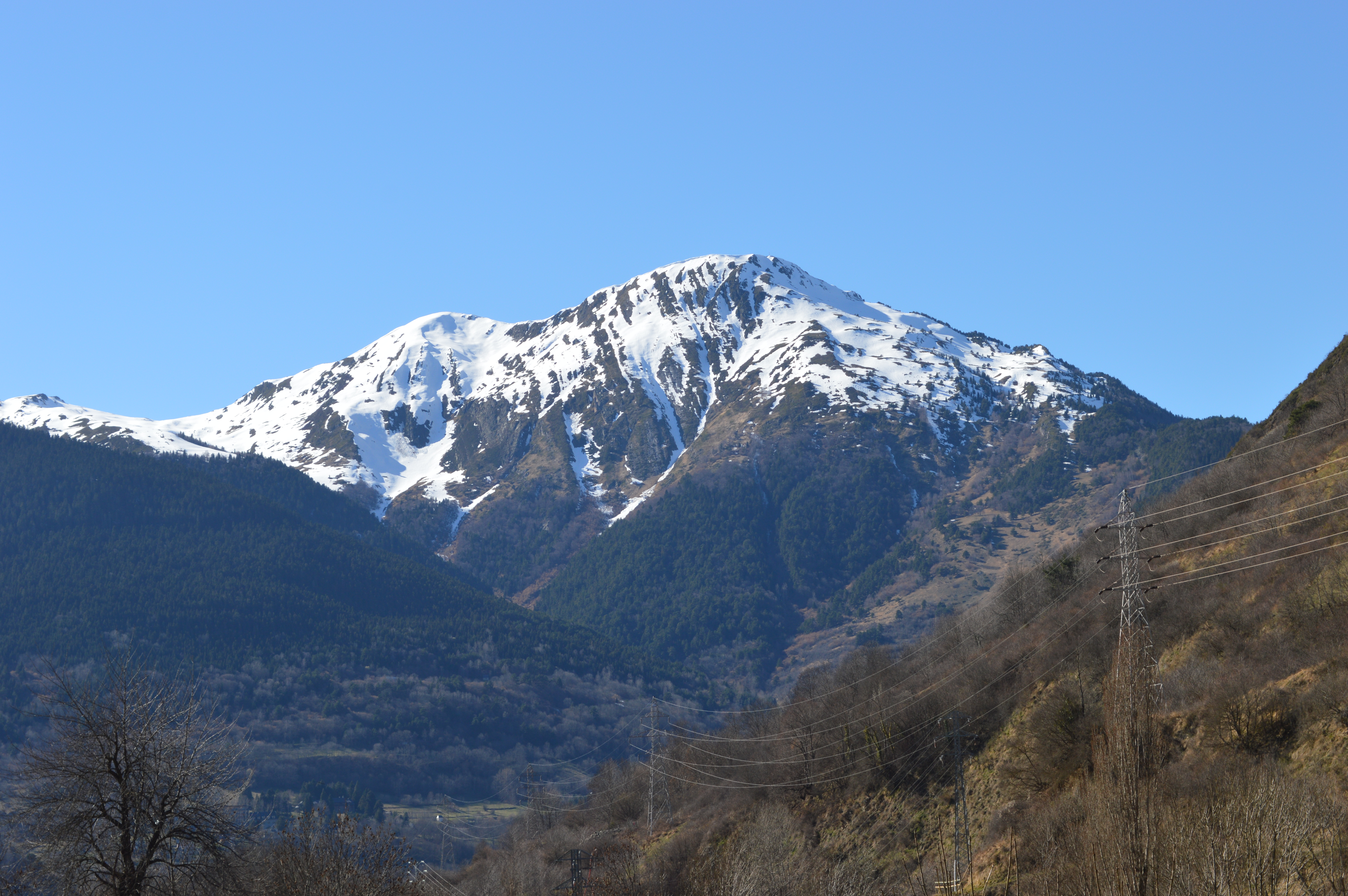 Montcorbison 12-03-2019